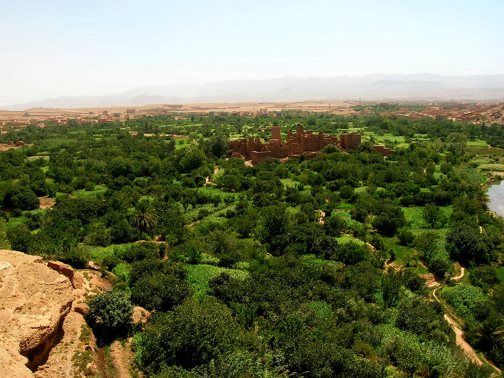 Paisatge del vall de Roses, el Kelaa M'gouna, un dels últims oasis anant cap a Merzouga, prop del desert del Sàhara.